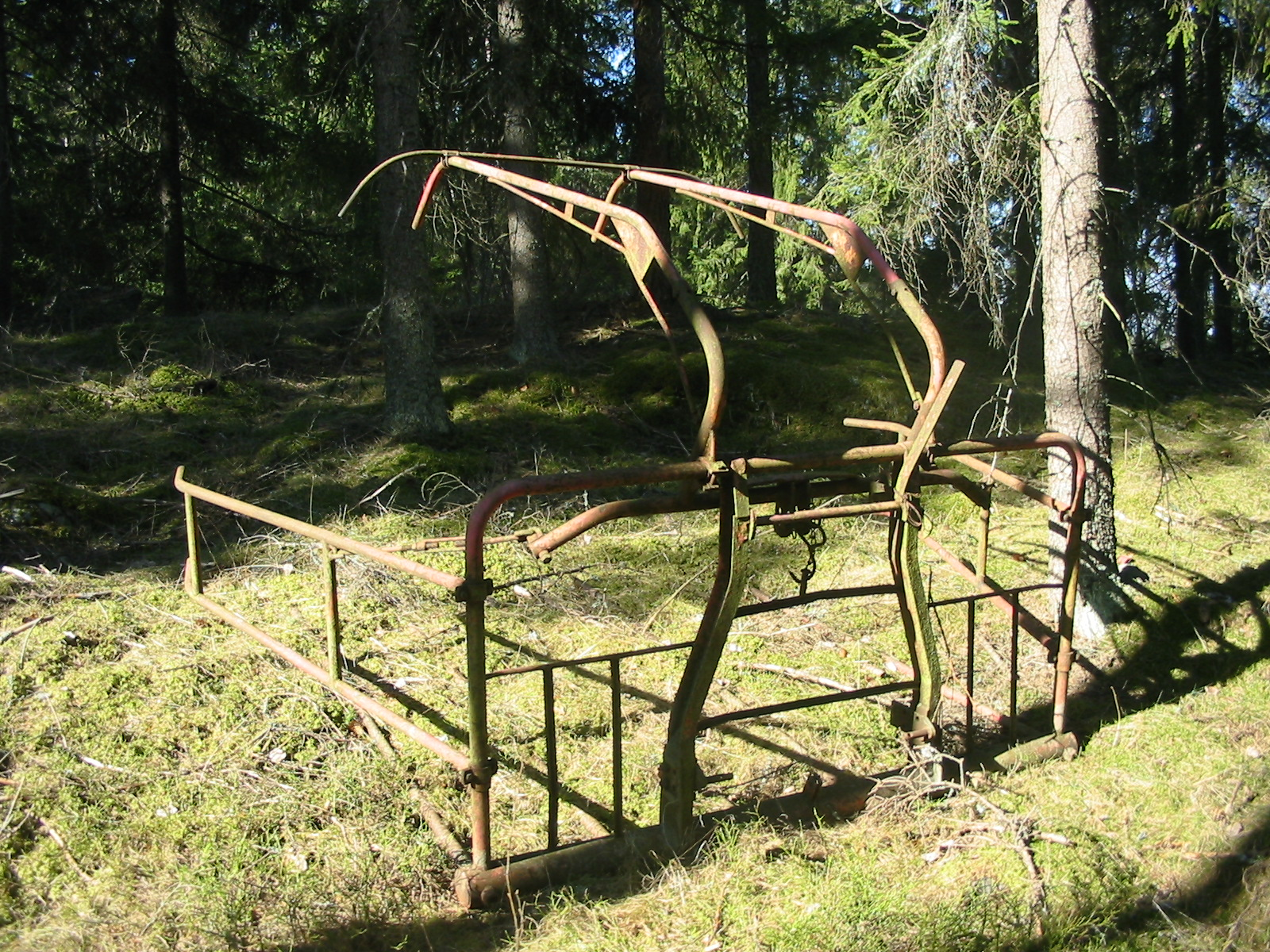 Hösvans